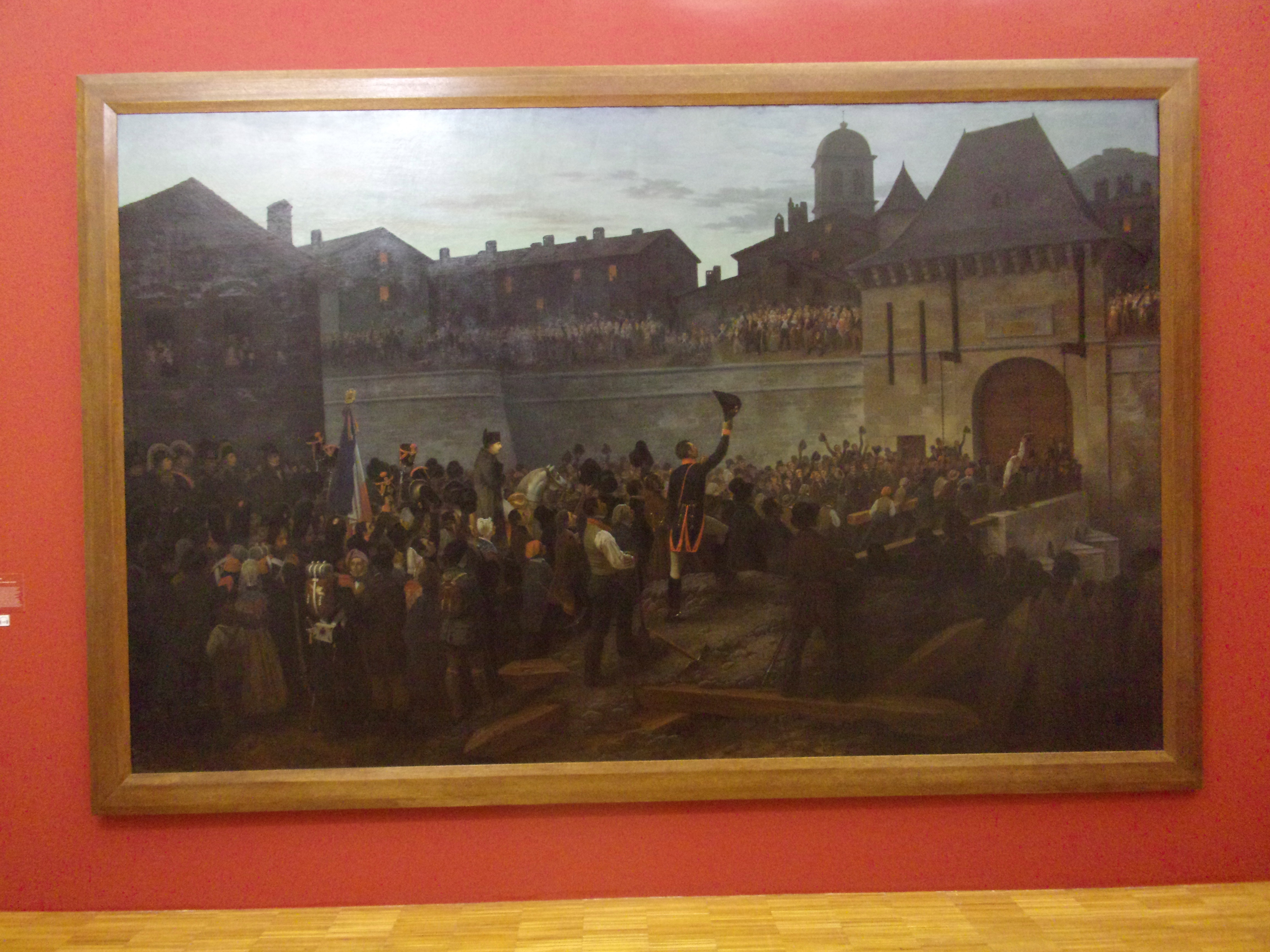 L'entrée de Napoléon à Grenoble en 1815. Dimensions du tableau : H 260 cm x L 410 cm, (Salon de Paris 1840)